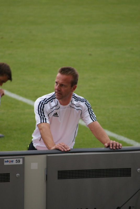 Peter Gagelmann